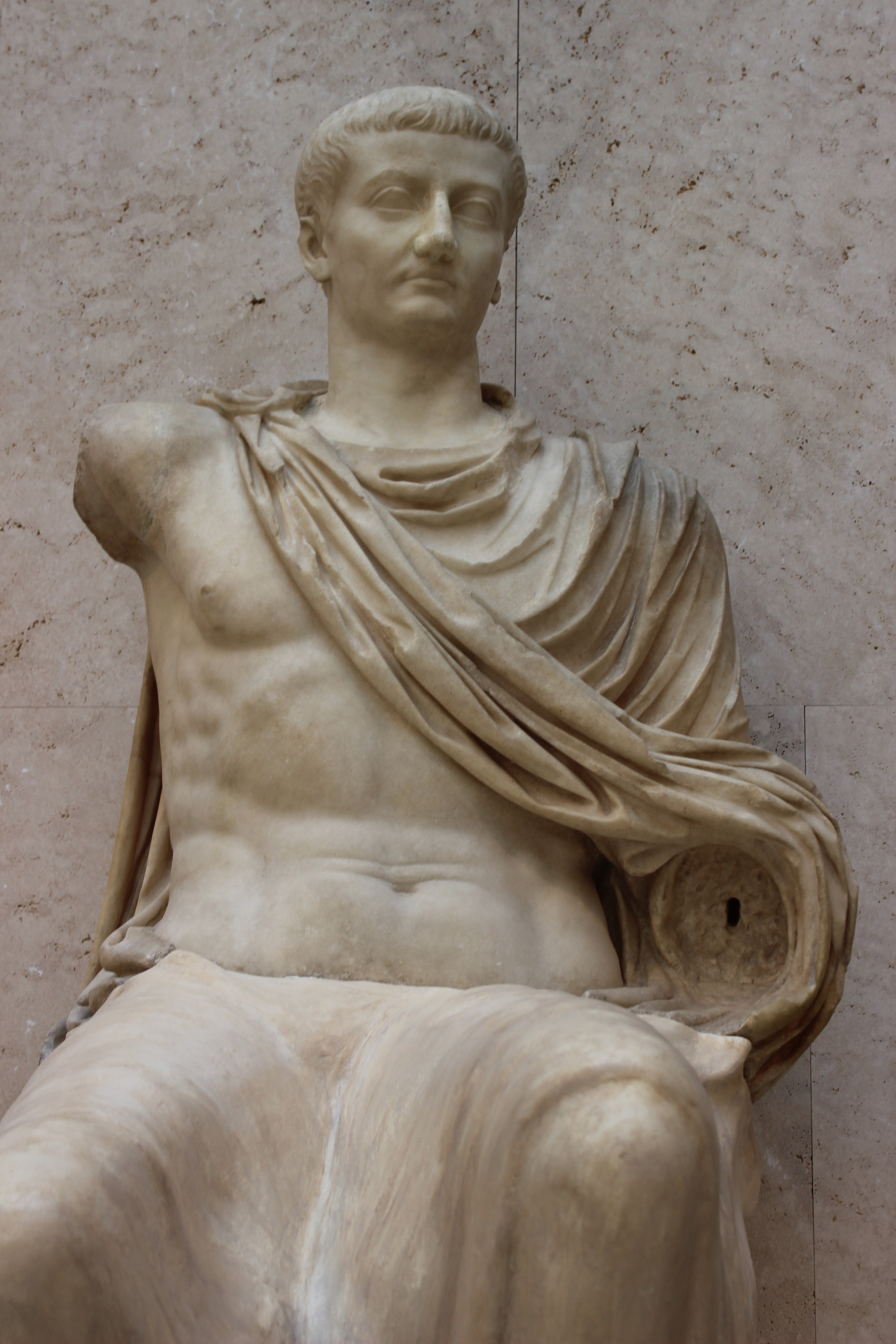 Madrid, Museo Arqueológico Nacional. Tiberio procedente de Paestum.